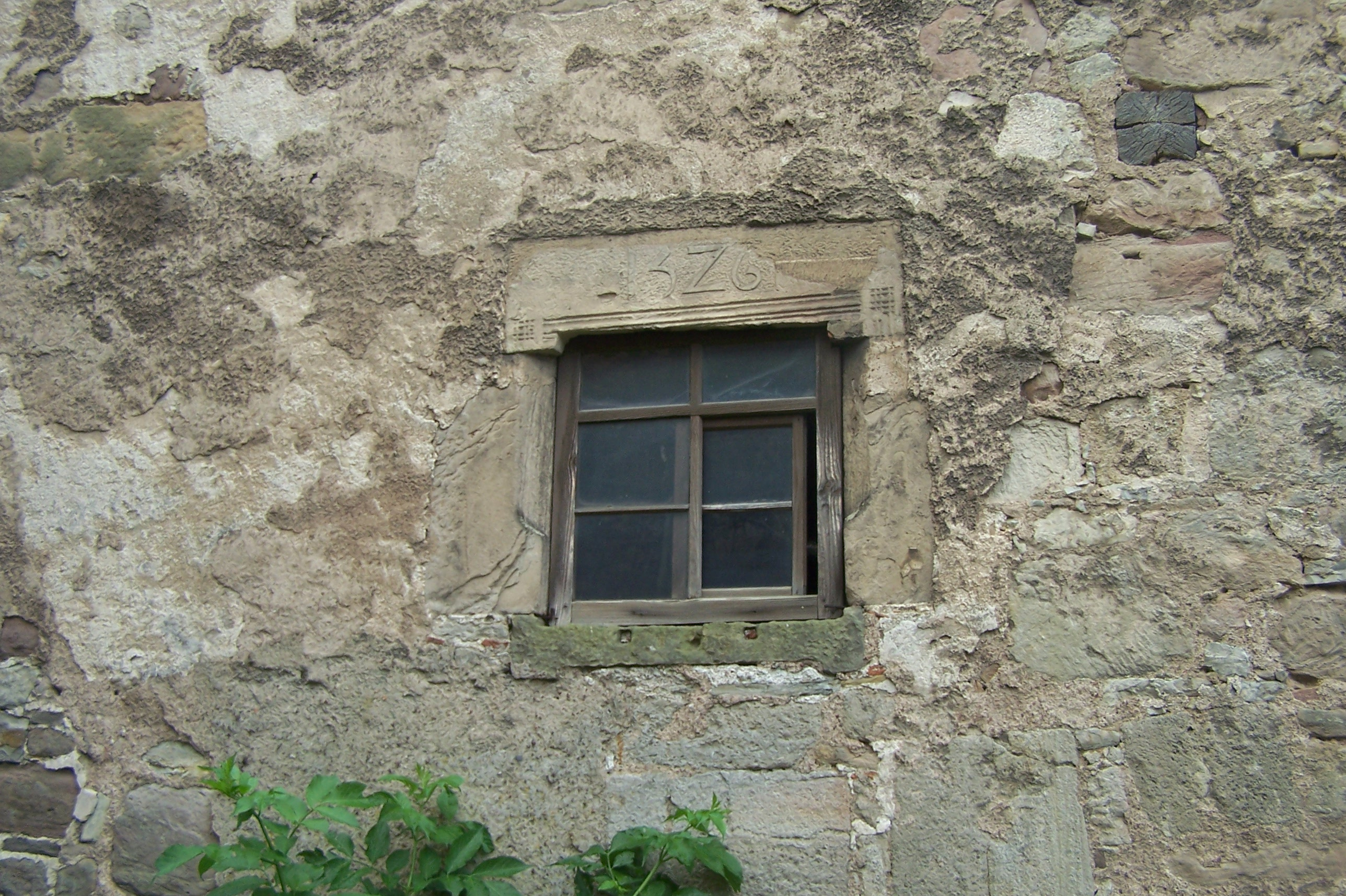 GTH Mechterstädt, Kemenate, Nordfassade (Innenhof), EG, Fenster mit CHRONOGRAMM (1526)